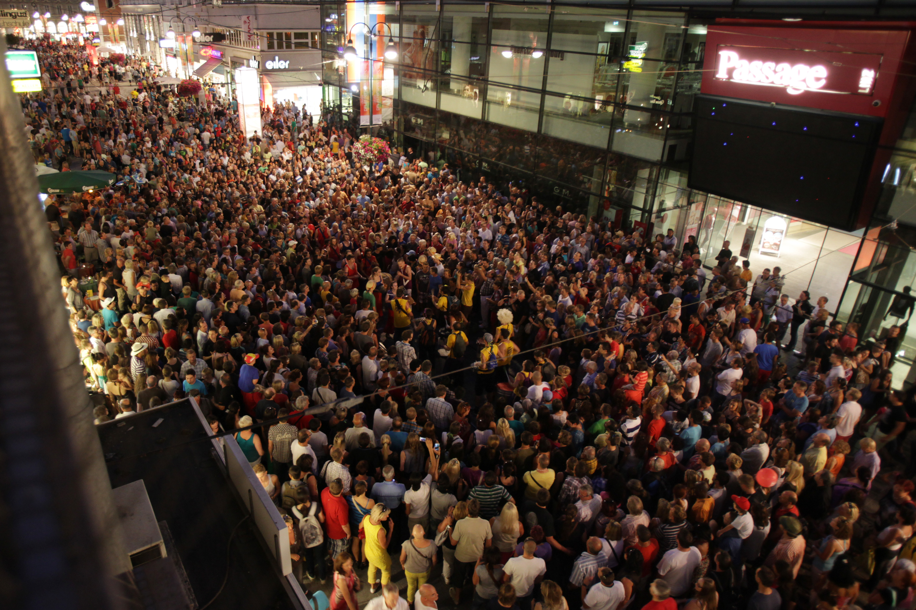 Pflasterspektakel in der Linzer Landstraße